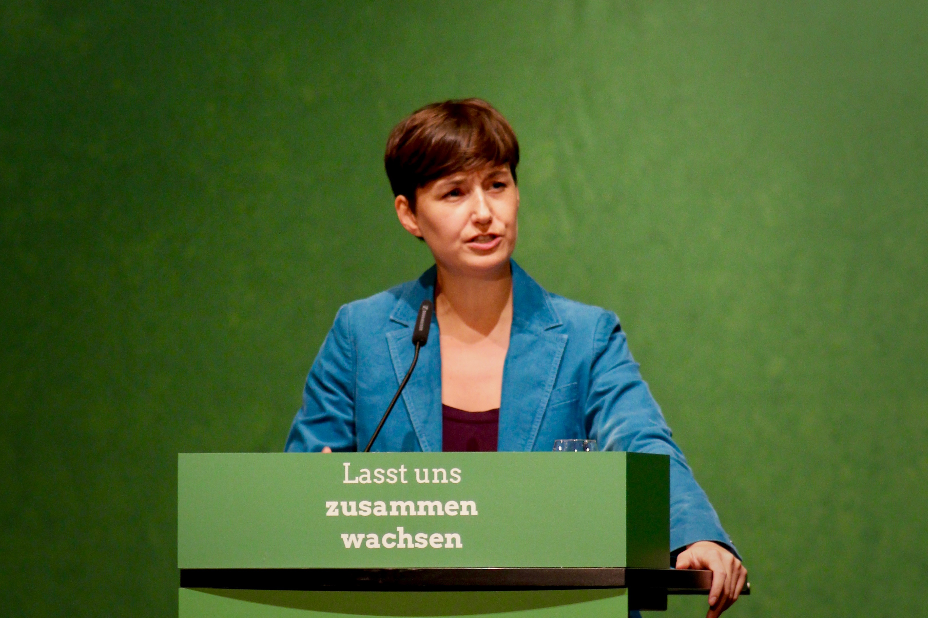 Sandra Detzer auf dem Landesparteitag der Grünen in Schwäbisch Gmünd im November 2016